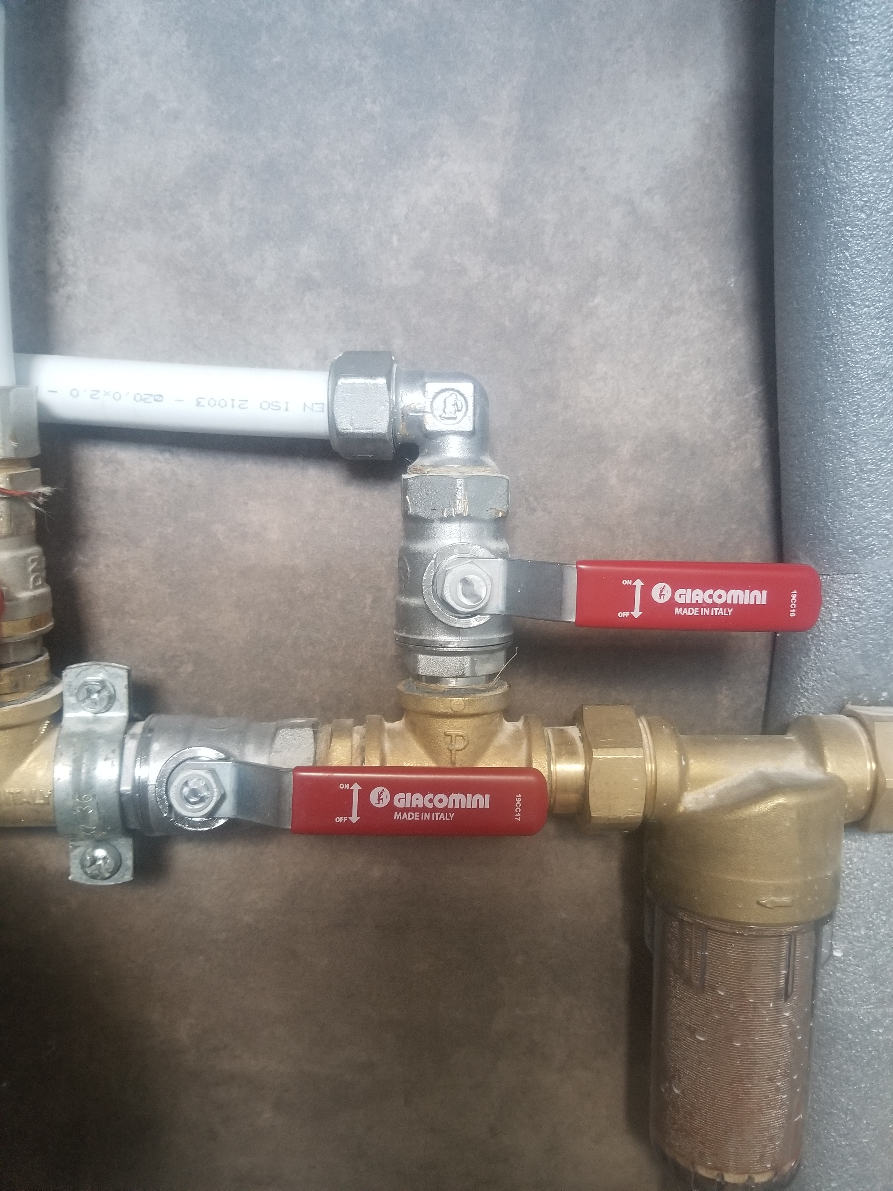 Ball valves application